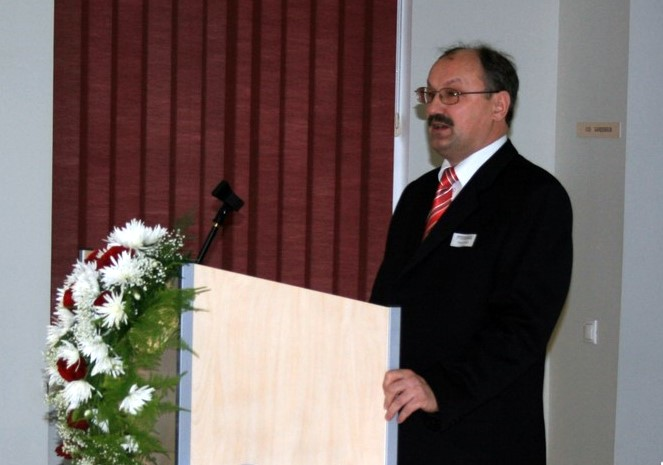 Tanel Linnus